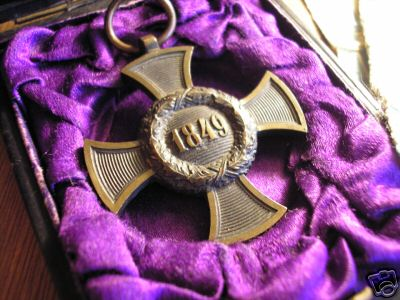 Armeedenkzeichen Bayern, 1849